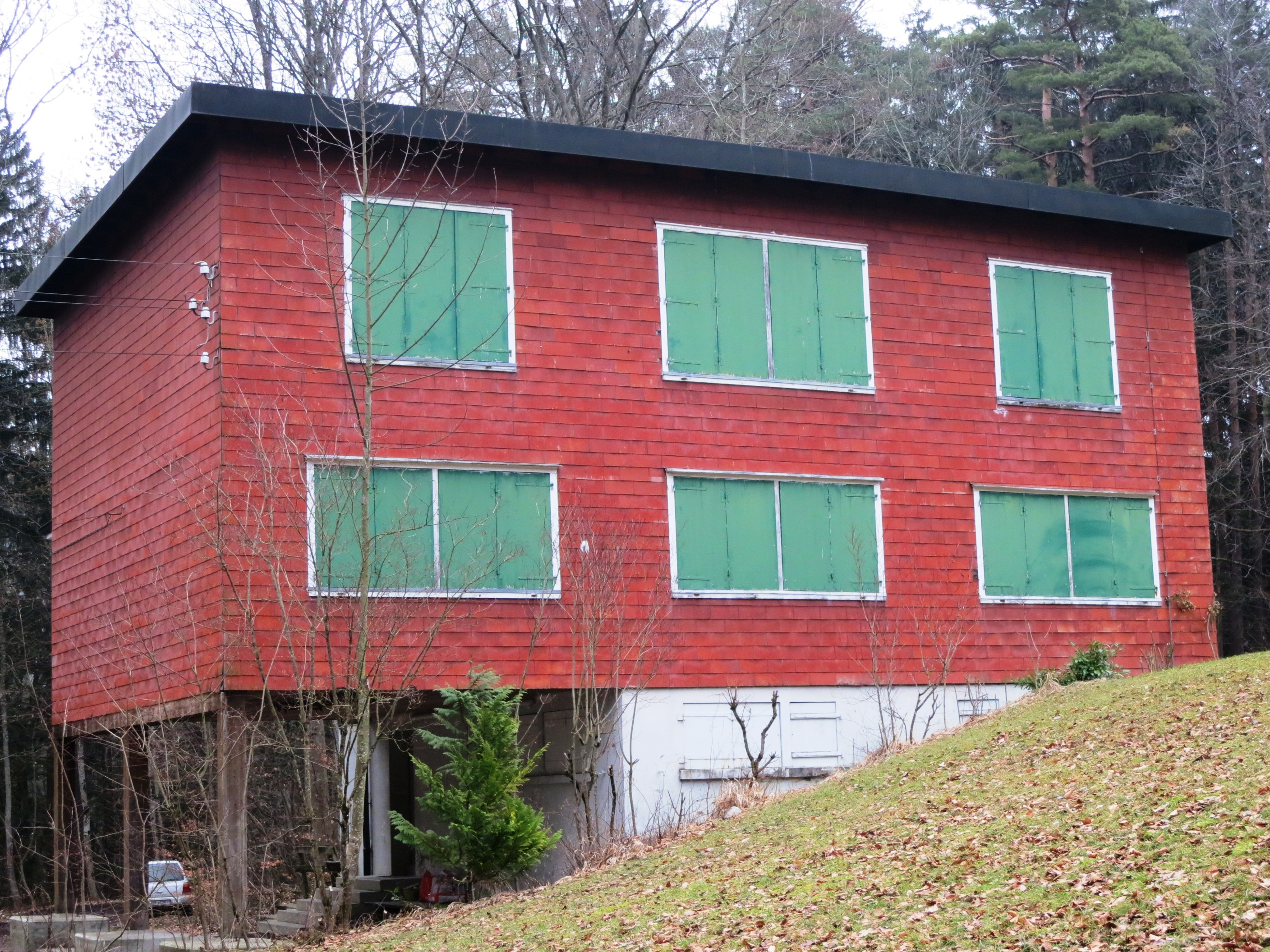 Ferienlagerhaus Mösli, Stallikon ZH, Schweiz; 1931 erbaut von der Zürcher Arbeiterbewegung